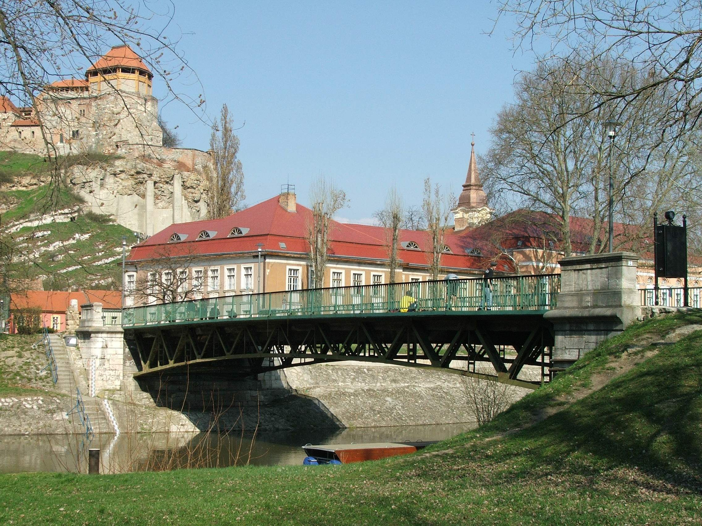 A Kossuth híd a Prímás-szigetről